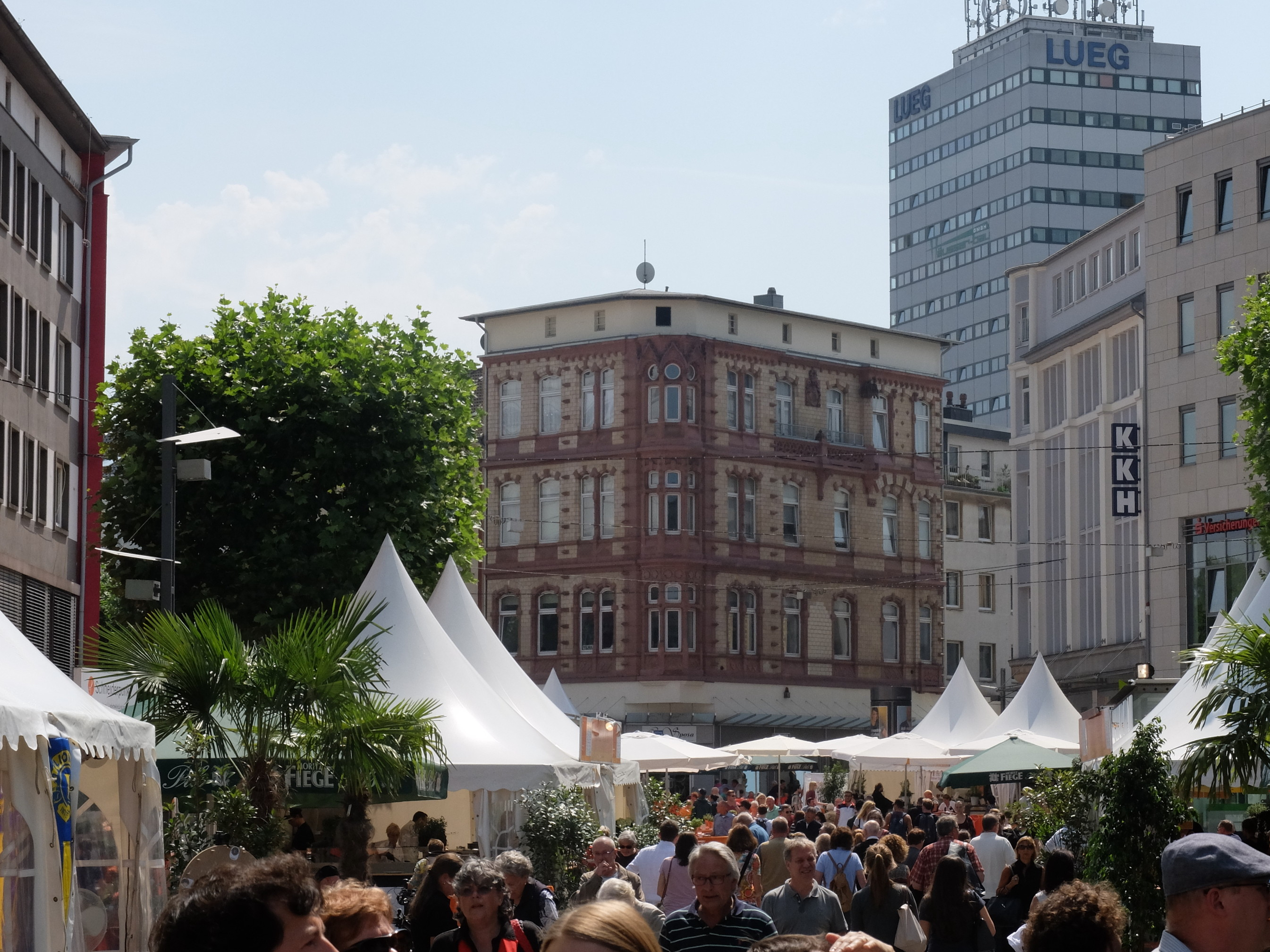 Veranstaltung Bochum kulinarisch 2015 auf der Bongardstraße.